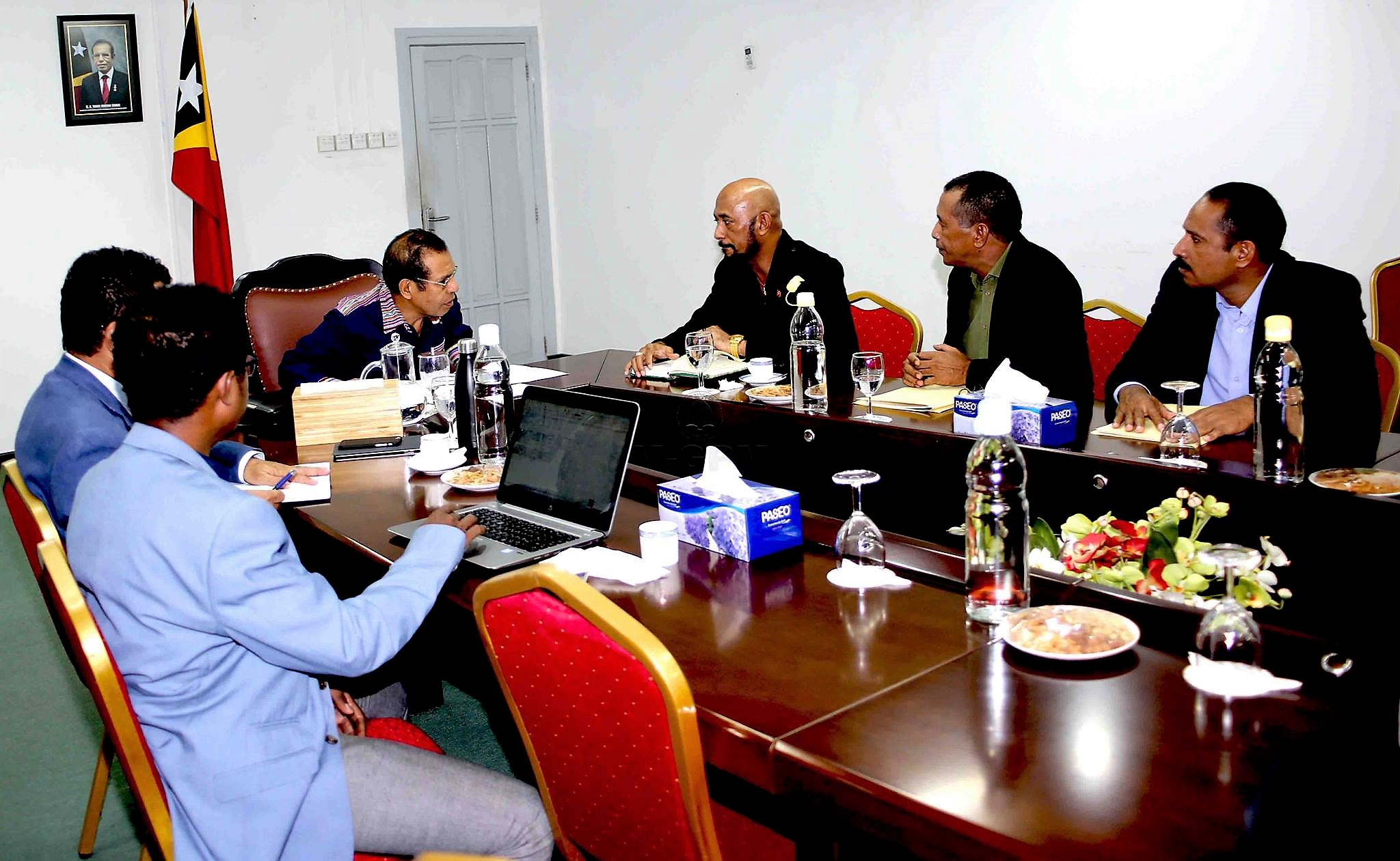 Sitzung mit Taur Matan Ruak und Arsénio Pereira da Silva